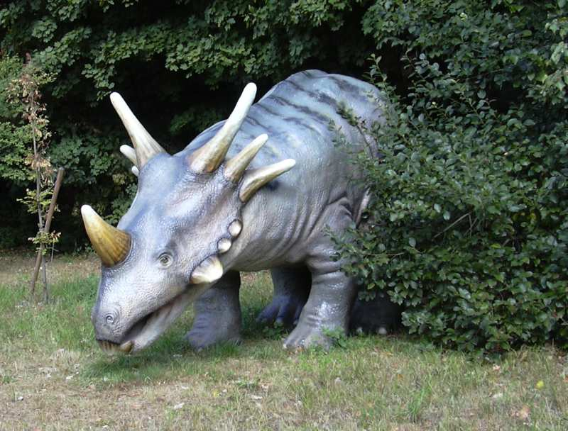 Dino-Modell in der Gartenschau Kaiserslautern (selbst fotografiert, public domain)